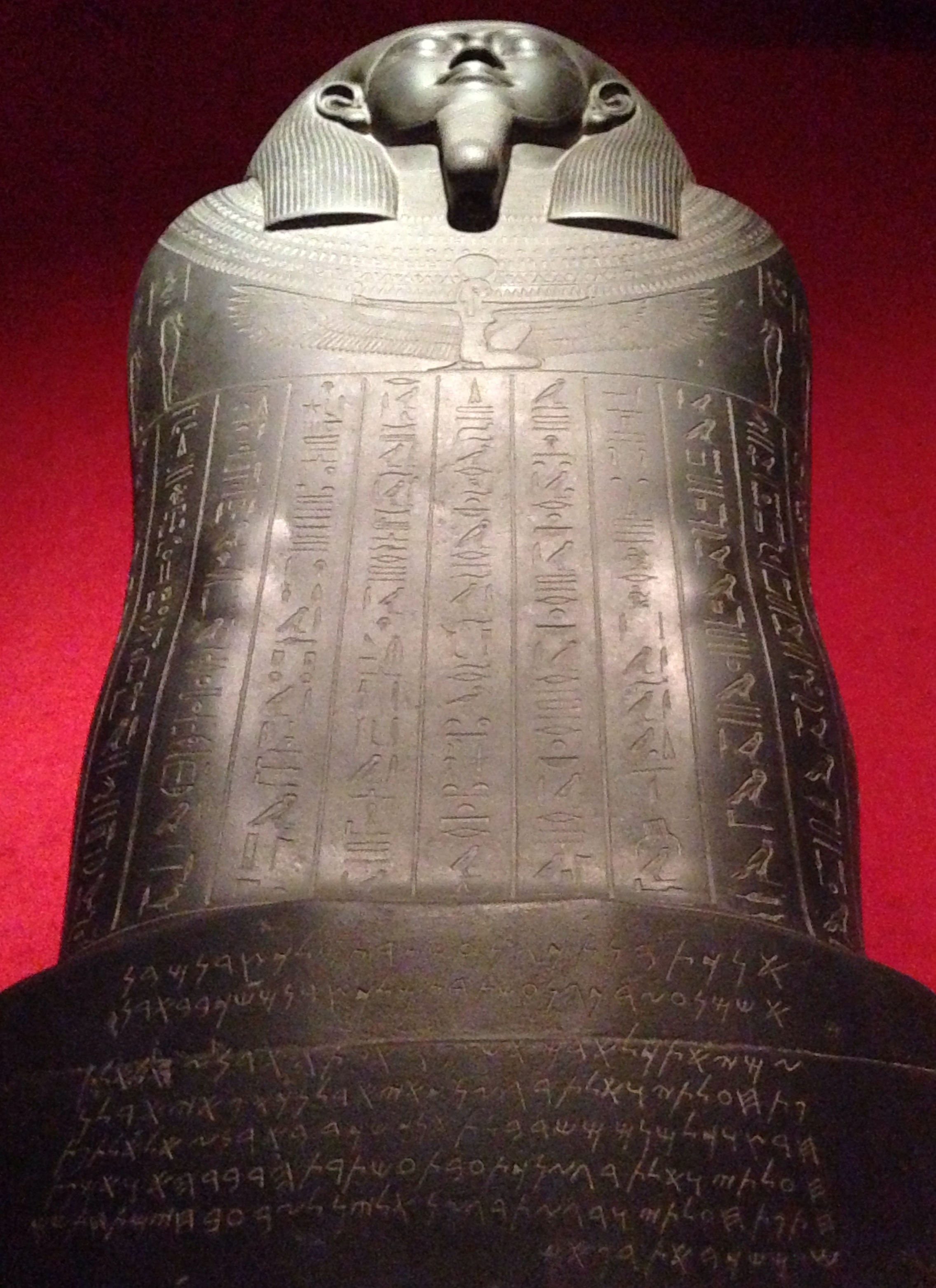 Tabnit sarcophagus